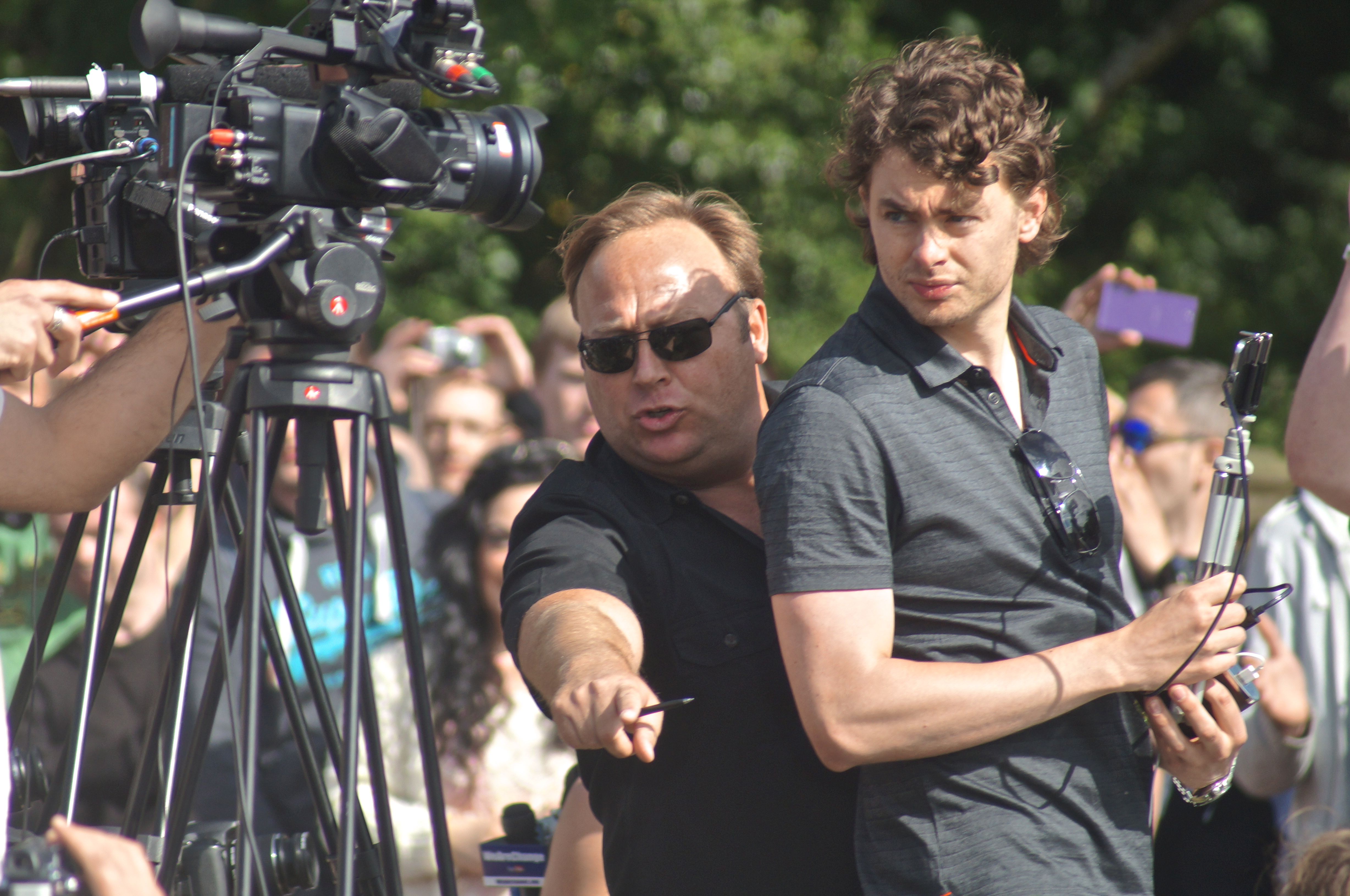 Alex Jones & Paul Joseph Watson